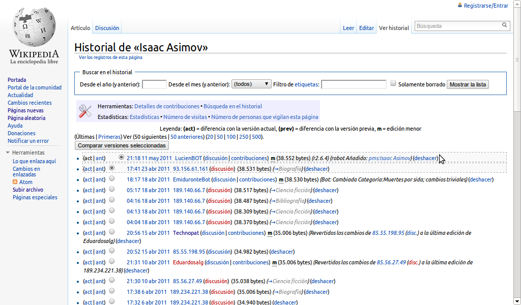 Página de historial del artículo Isaac Asimov